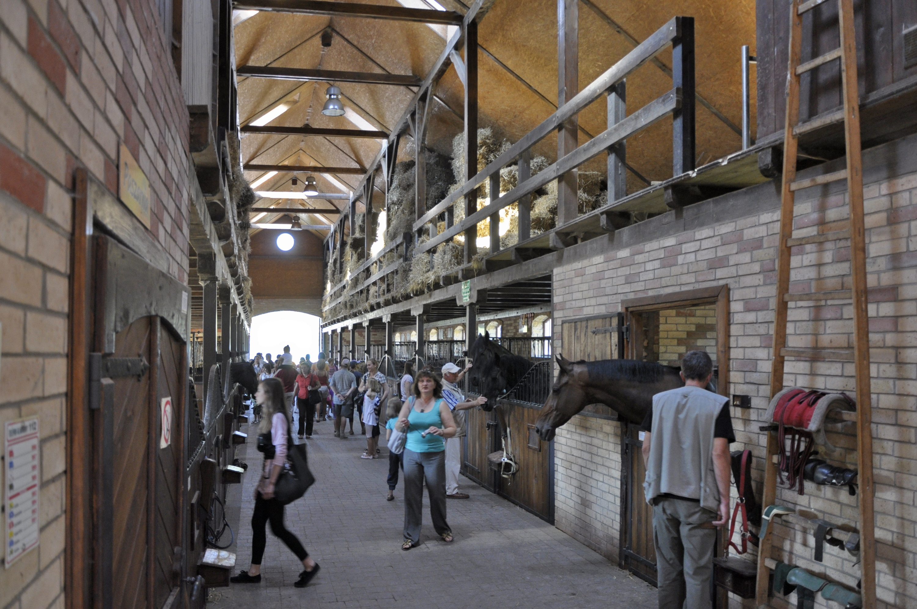 JuraPark Bałtów - stajnia